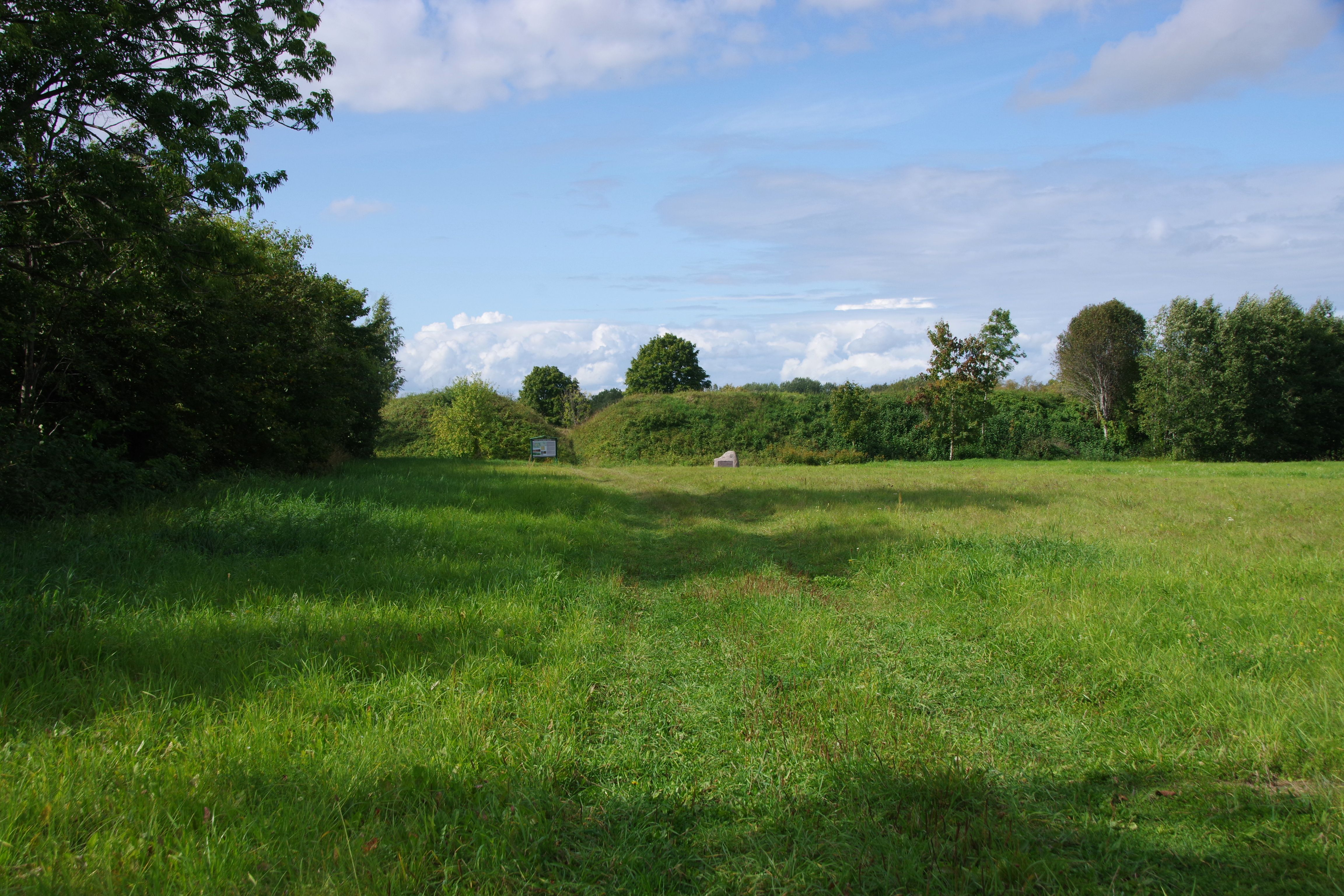 Karuse Linnuse maalinn asub Hanila vallas (omaaegne Karuse kihelkond) Linnuse küla maal.